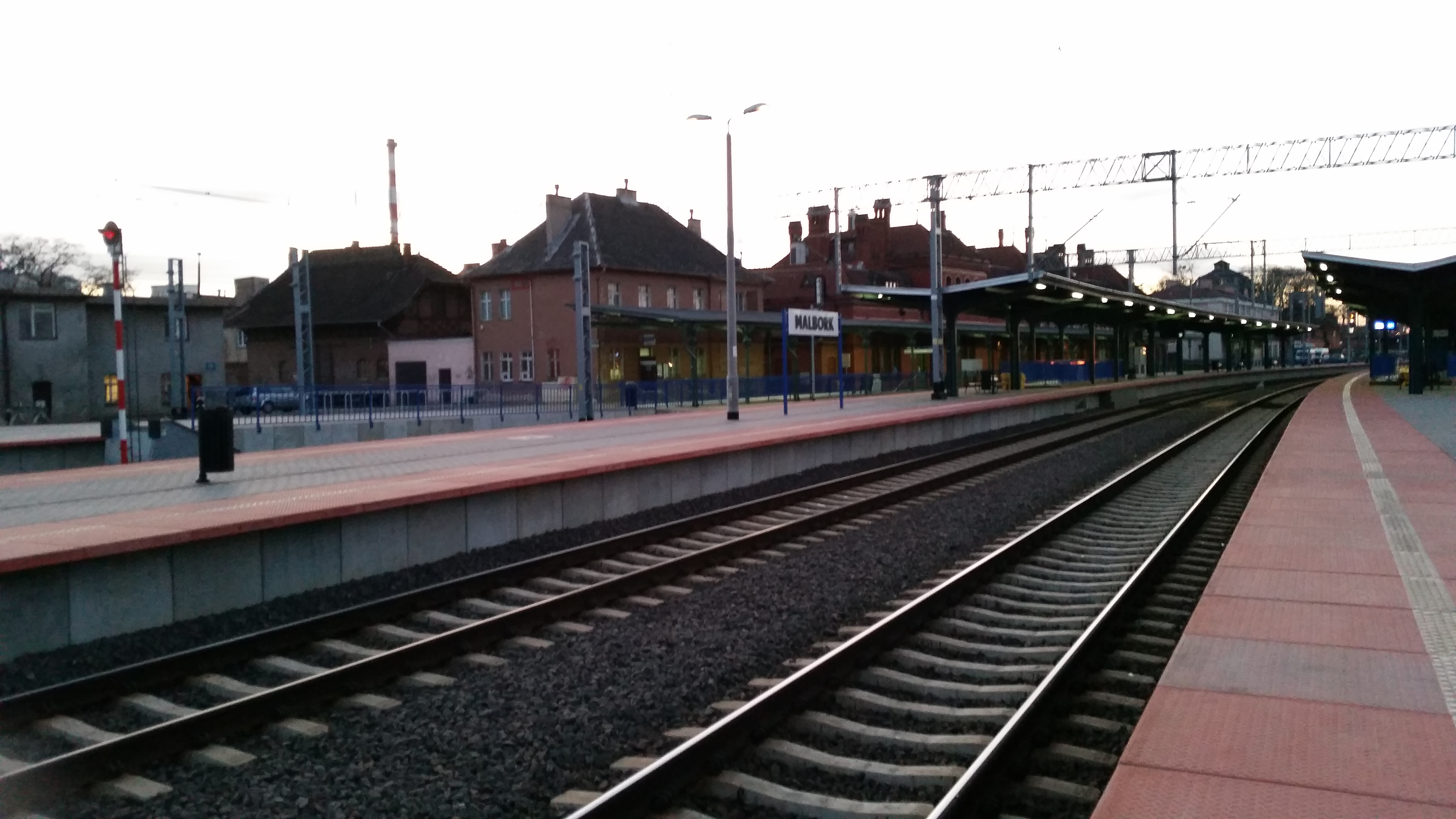 Widok na peron 2 na stacji kolejowej w Malborku